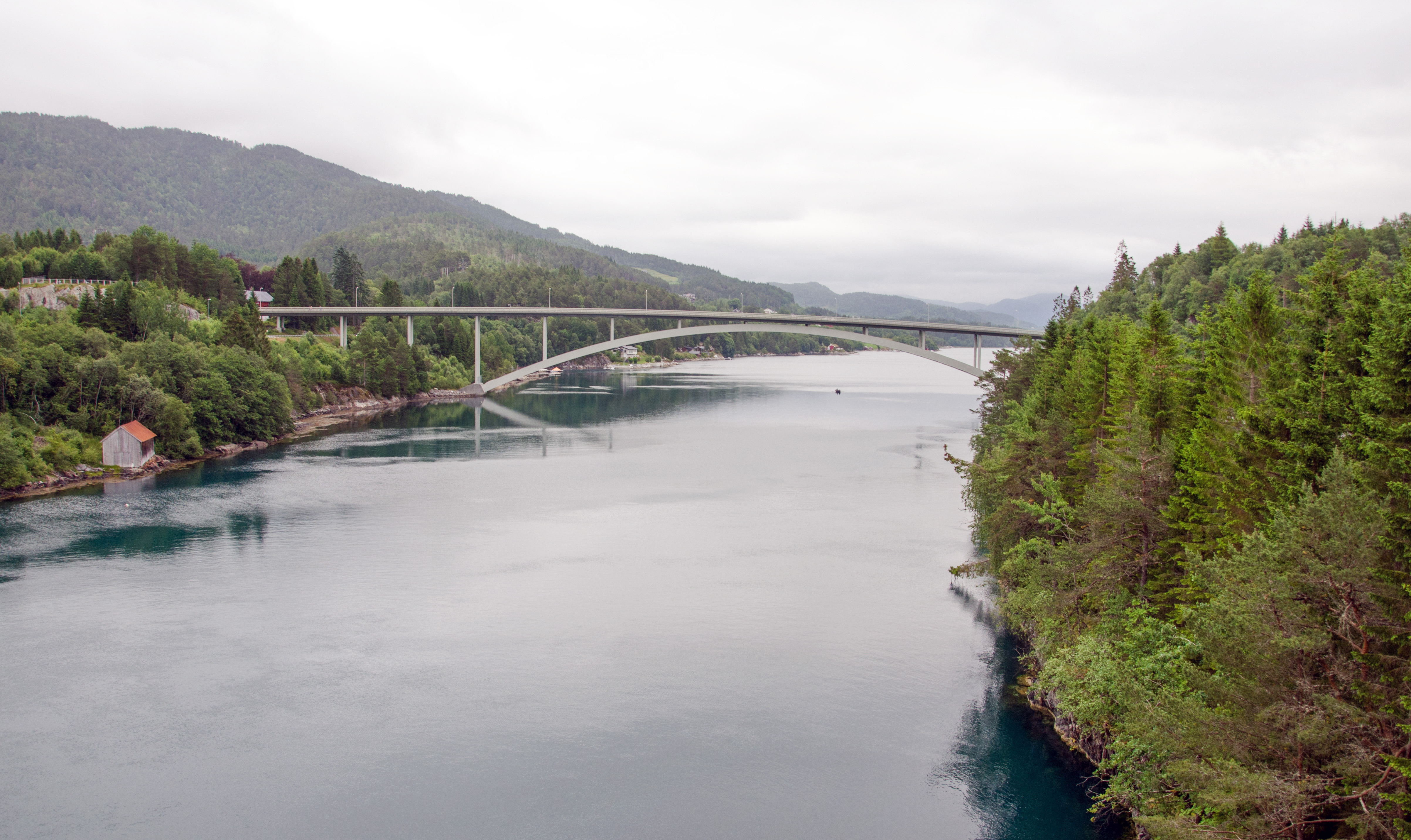 Straumsbrua på fylkesvei 661 i Skodje, Møre og Romsdal